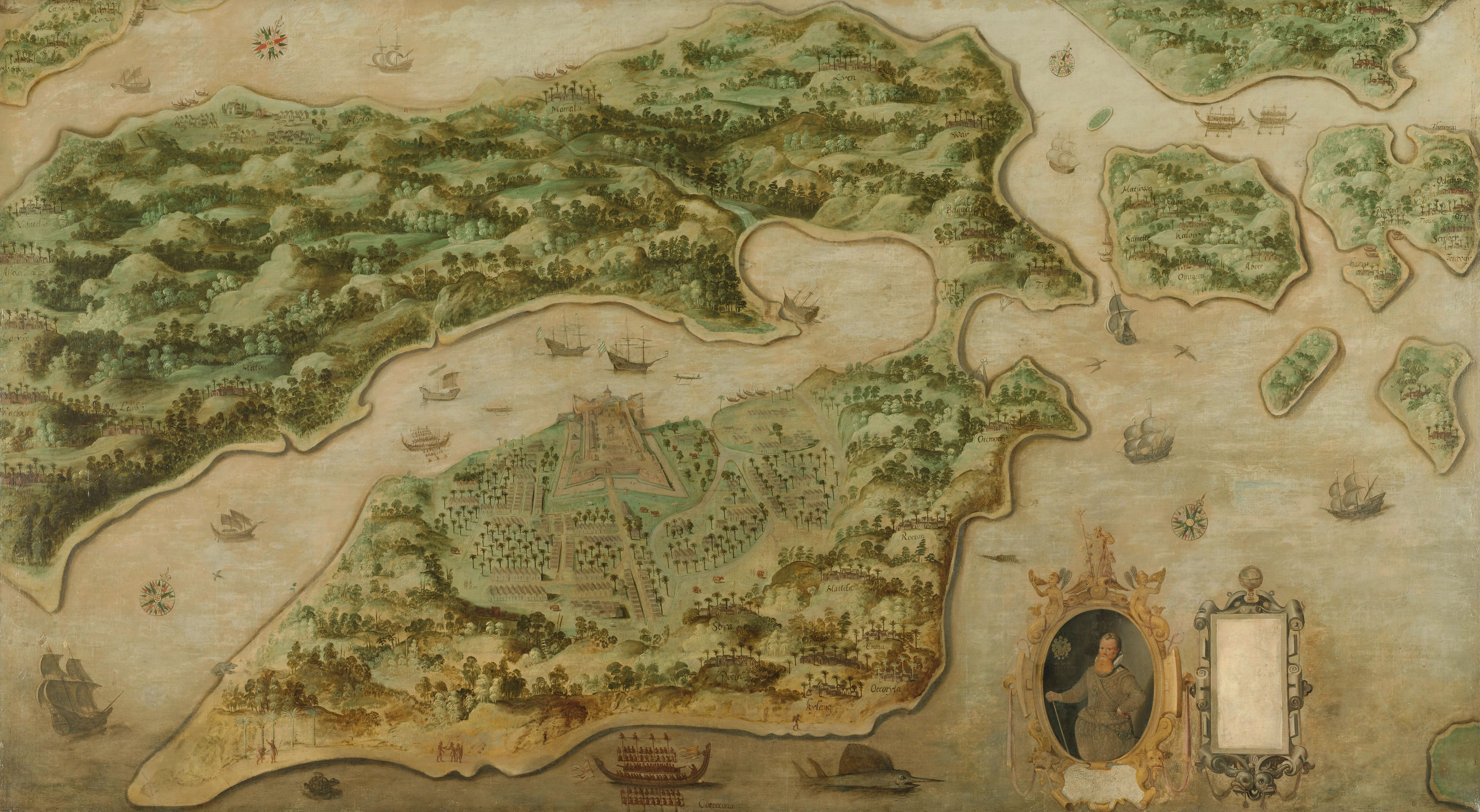 Gezicht op Ambon in vogelperspectief met in een cartouche bekroond met Neptunus en zeewezens het portret van Frederik Houtman, gouverneur van Ambona (1605-11). Aan de baai ligt het door de Portugezen gebouwde fort dat in in 1605 door de Nederlanders werd veroverd. Op het eiland Ambon zijn met plaatsnamen de verschillende nederzettingen aangeduid. Op het water galeien, schepen en onderaan een zwaardvis.; Olieverf op doek, ca. 1617